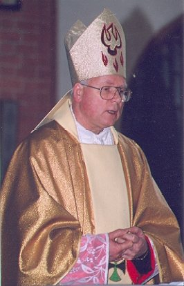 Biskup Józef Wysocki